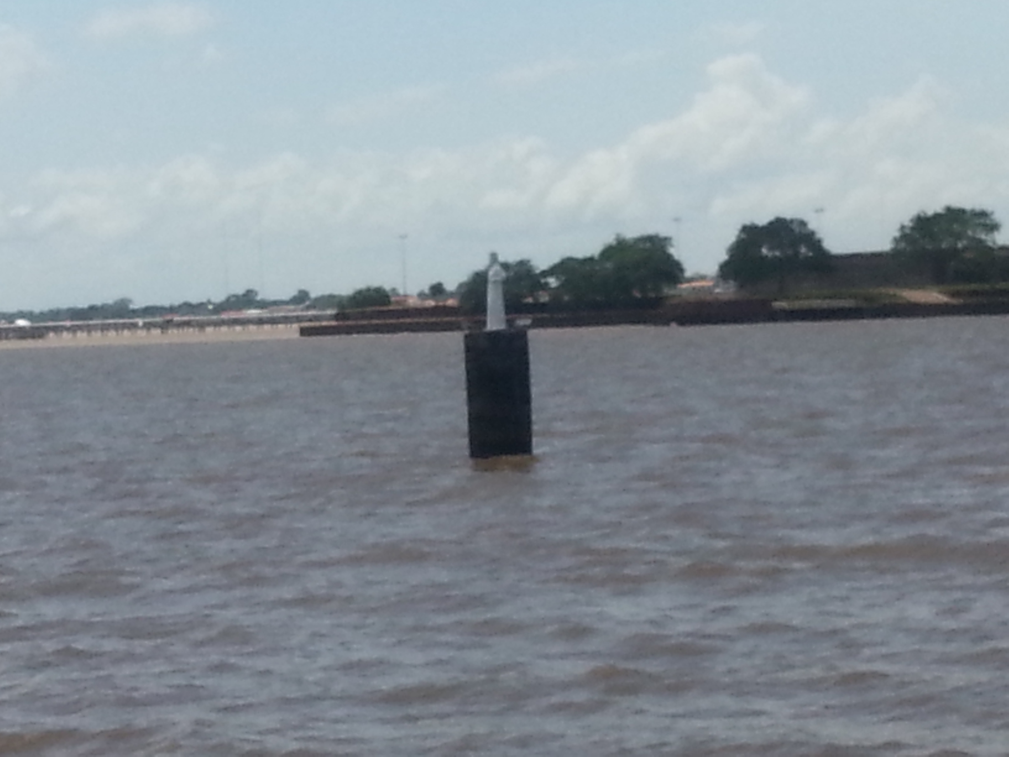 Praça Zaguri, 1423-1569 - Central, Macapá - AP, Brazil